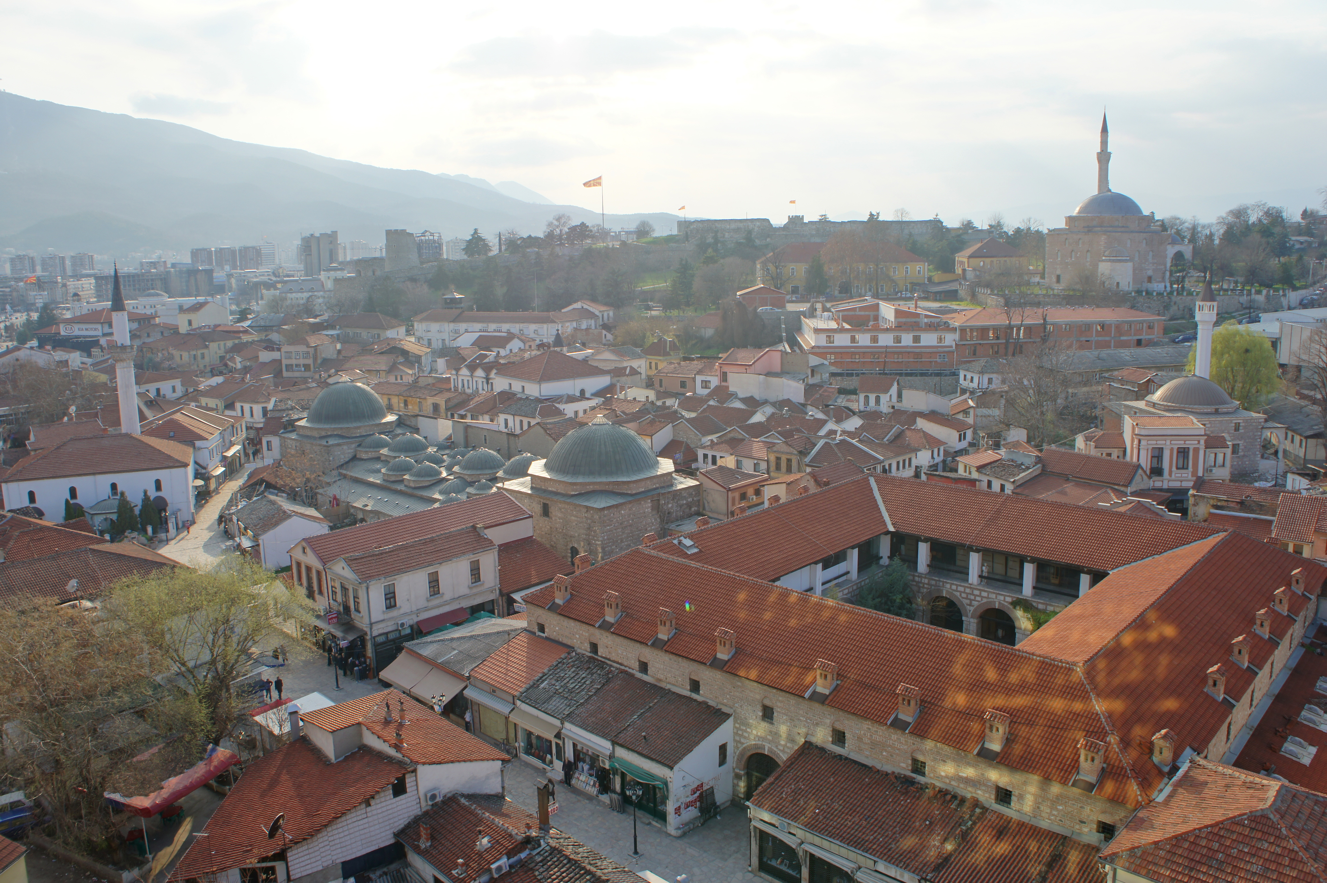 Скопската чаршија претставува посебен, многу значаен и интересен комплекс од турско-градска архитектура. о време на отоманското владеење со Скопје, местото забрзано прераснало во најголем трговски дел од градот, во кој се наоѓале околу 30 џамии, бројни сараи и анови, како и други турски споменици.